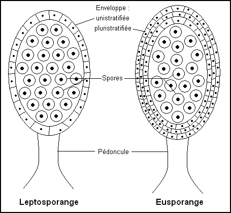 Schéma de leptosporange et eusporange.